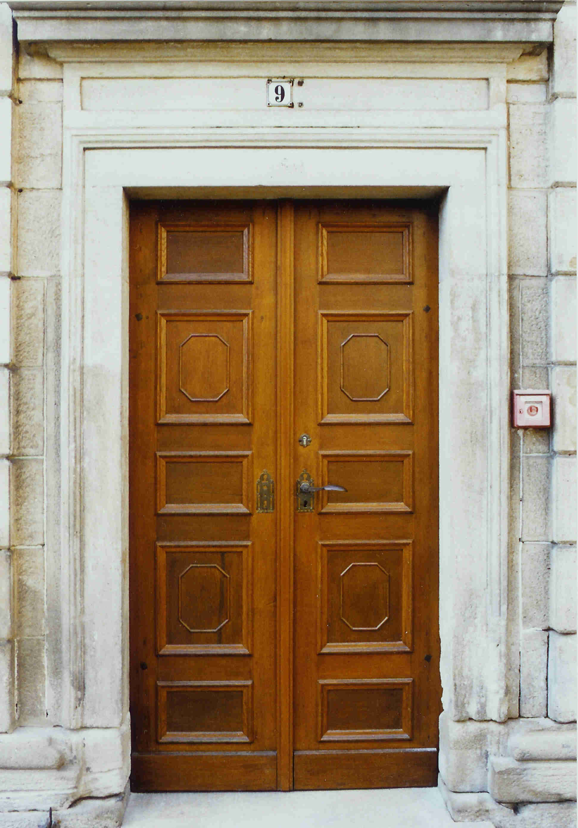 Walddorfhäslach Rathaus Walddorf Portal Klassizismus 1845